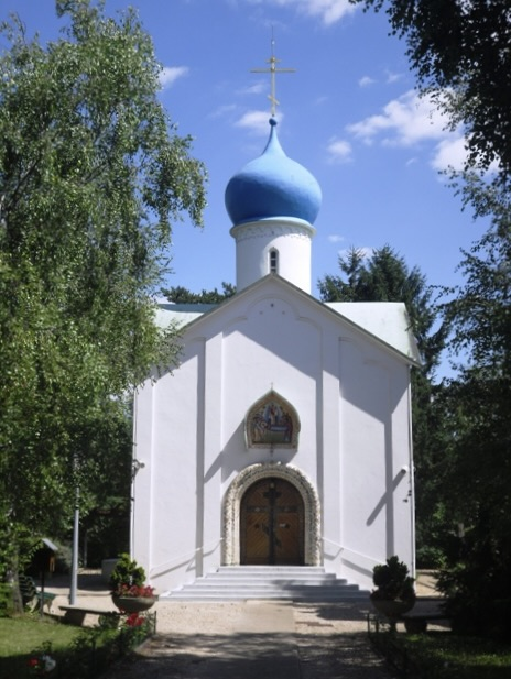 L'église orthodoxe Notre-Dame-de-la-Dormition de Sainte-Geneviève-des-Bois (91)